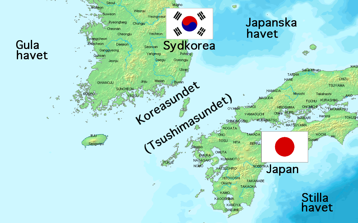 Karta över Koreasundet/Tsushimasundet